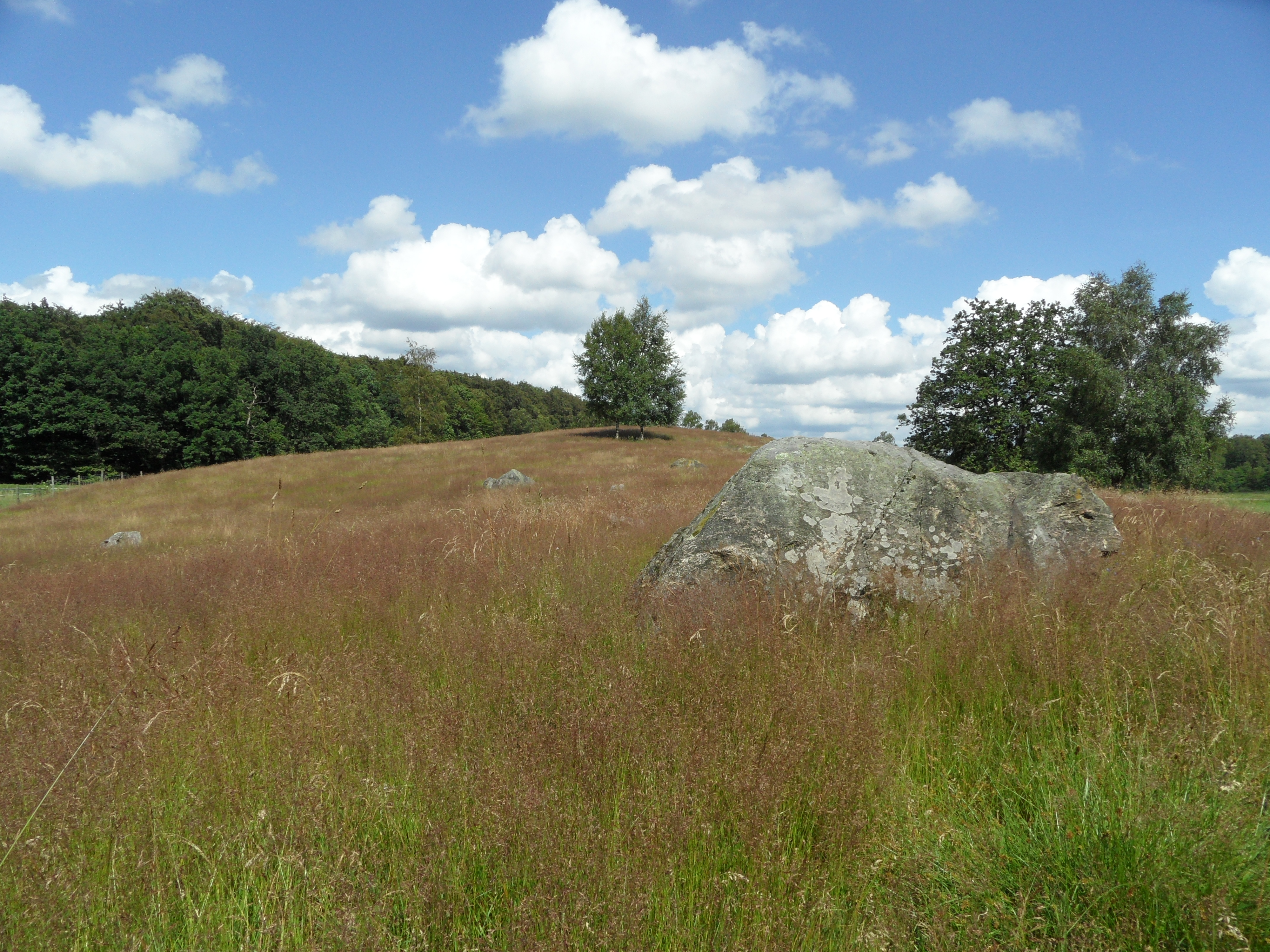 Naturreservatet Ekastiga